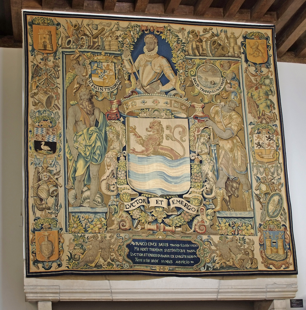 Wapentapijt Willem van Oranje, Hendrick de Maecht Wapentapijt, Willem van Oranje, Hendrick de Maecht 1594 - 1599